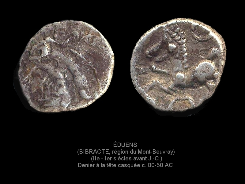 Denier d'argent à la tête casquée. Tribu des Eduens vers 80-50 AC.